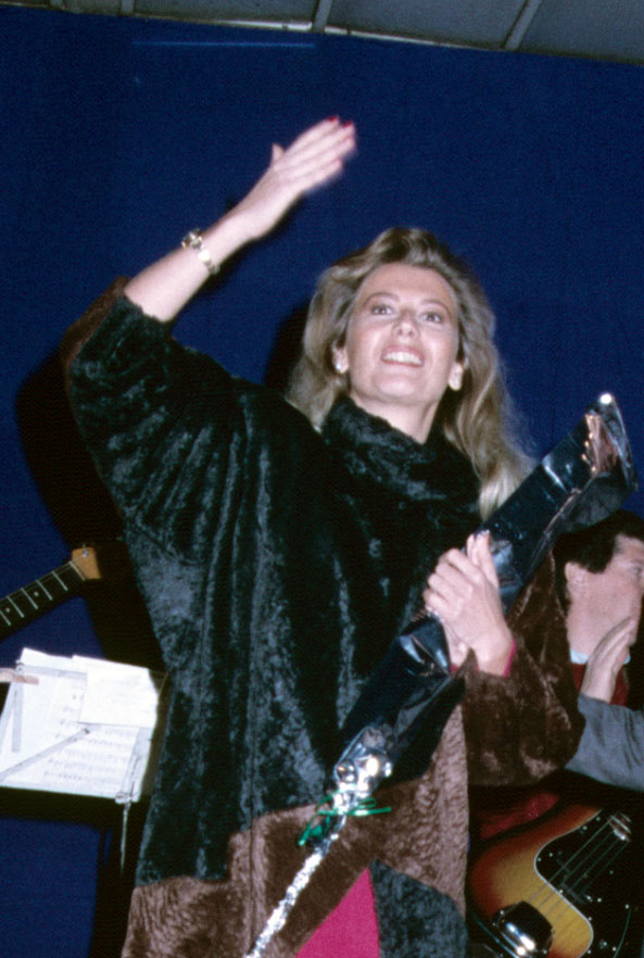 on work